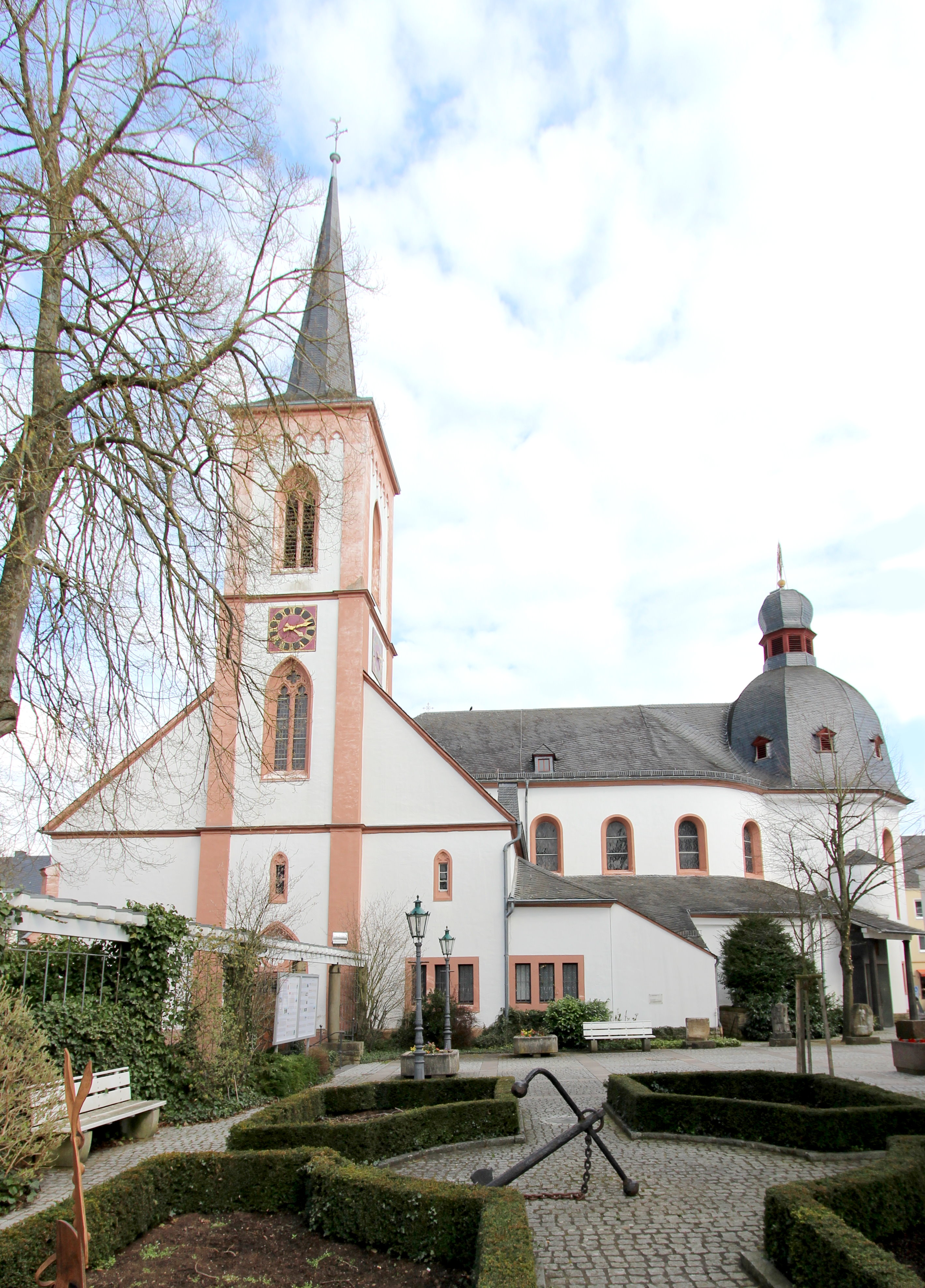 54634 Bitburg, Rathausplatz. Im Kern spätgotischer Saal, Erweiterung zu dreischiffiger Halle mit Westturm 1860, Architekt Alexander Franz Himpler, lotrechte, barockisierende Erweiterung, 1922/23, Architekt Eduard Endler, Köln; im Winkel zwischen Alt- und Erweiterungsbau Barockportal, 1751; mit Ausstattung. Orgelbau der Firma Späth 1962; später (1986) von Gustav Cartellieri aus Wittlich überarbeitet. Aufnahme von 2018.